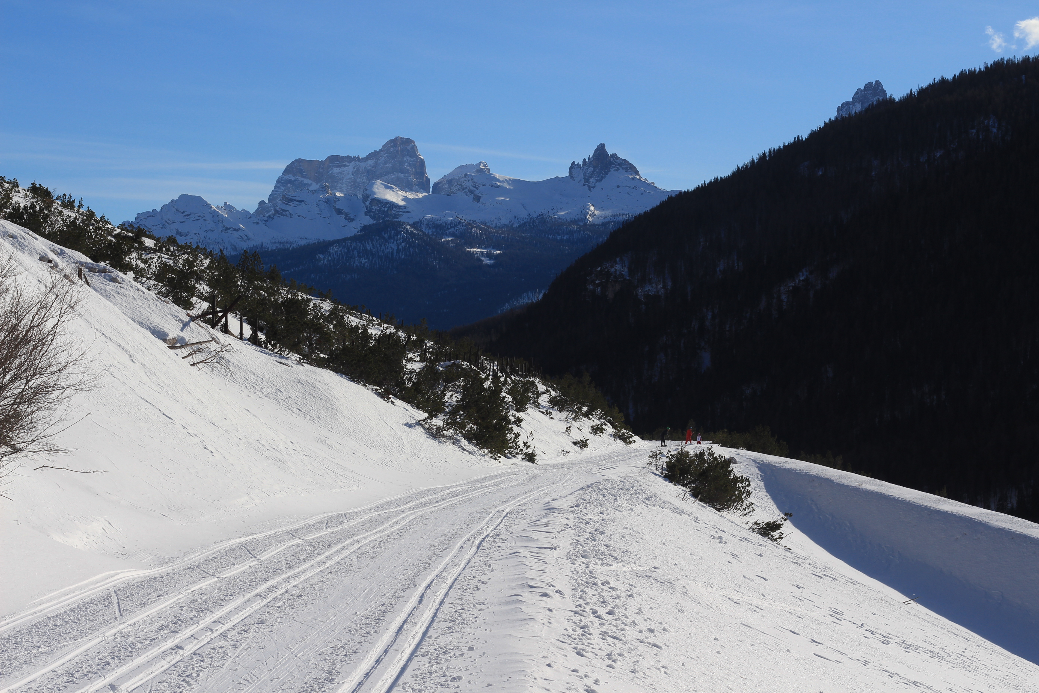 Cortina D'Ampezzo, Fiames